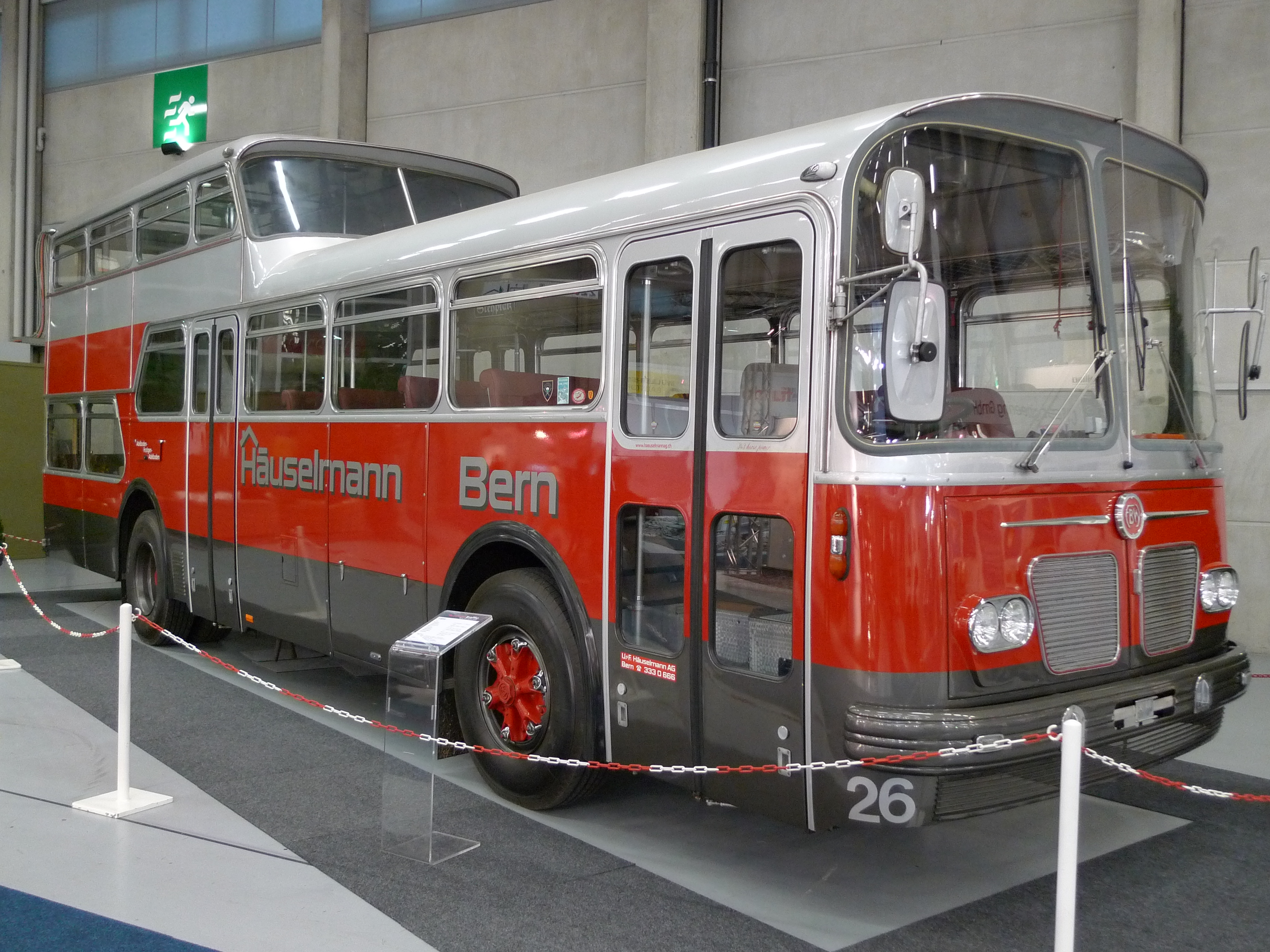 FBW / Walter Vetter Fellbach Autobus 1½ Stock, Baujahr 1966, Motor EDU/A, Sitzplätze 61, Stehplätze 0. Im Einsatz zwischen Frutigen und Adelboden (Schweiz) 1966-1988.